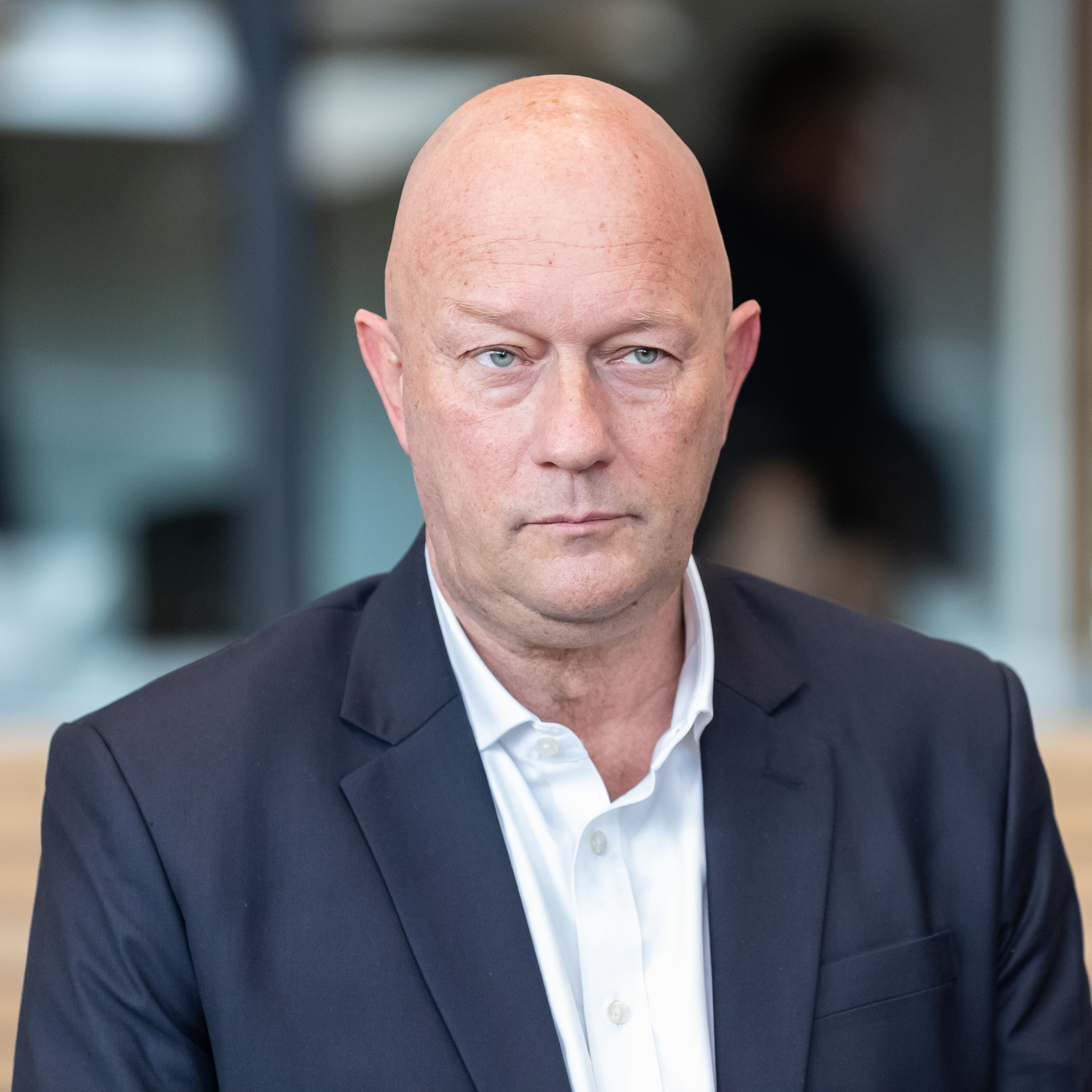 Thüringer Landtag, Wahl des Ministerpräsidenten: Thomas L. Kemmerich (FDP, Landes- und Fraktionsvorsitzender in Thüringen); Porträt, Einzelbild